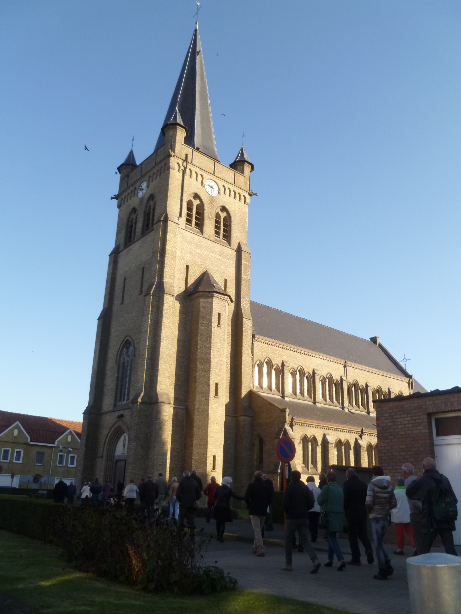 Sint-Medarduskerk, Wijtschate, België.